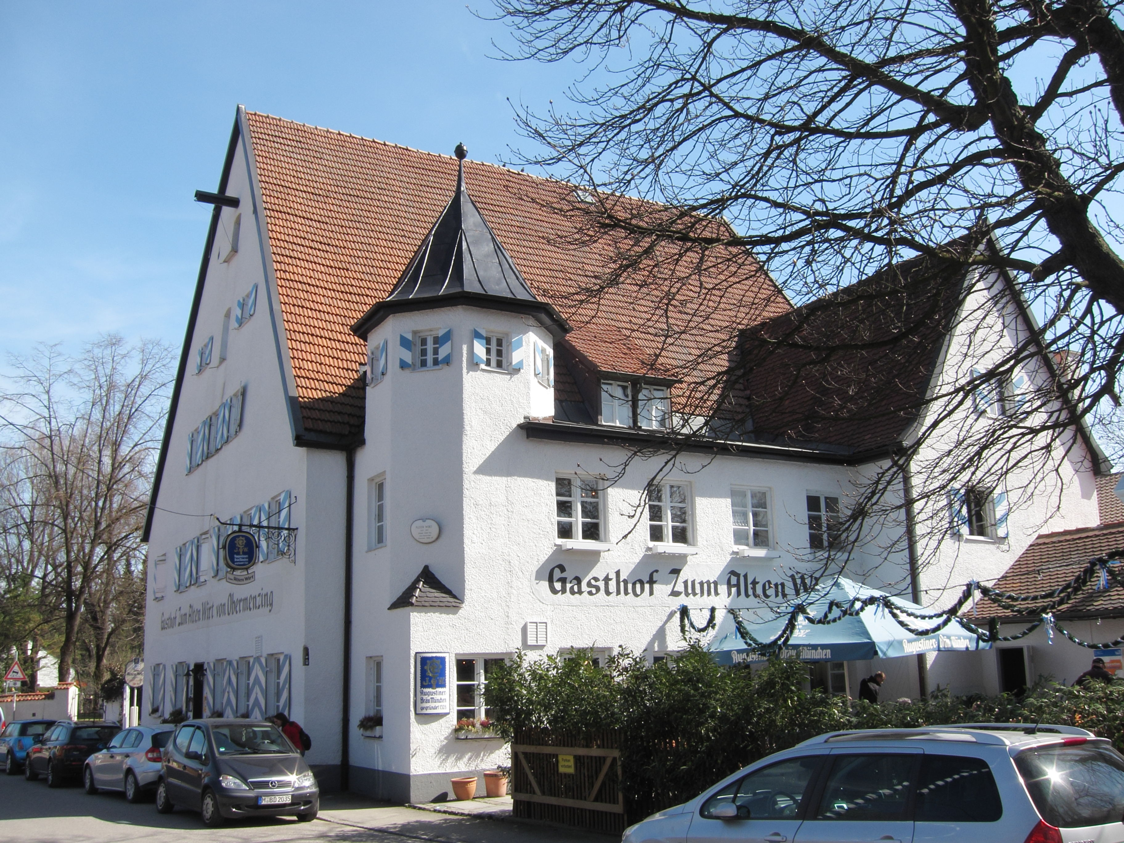 Dorfstraße 39; Gasthof Alter Wirt, stattlicher, zweigeschossiger Satteldachbau, mit Türmchen, im Kern 1589-90, 1911 durch die Gebrüder Ott erweitert.